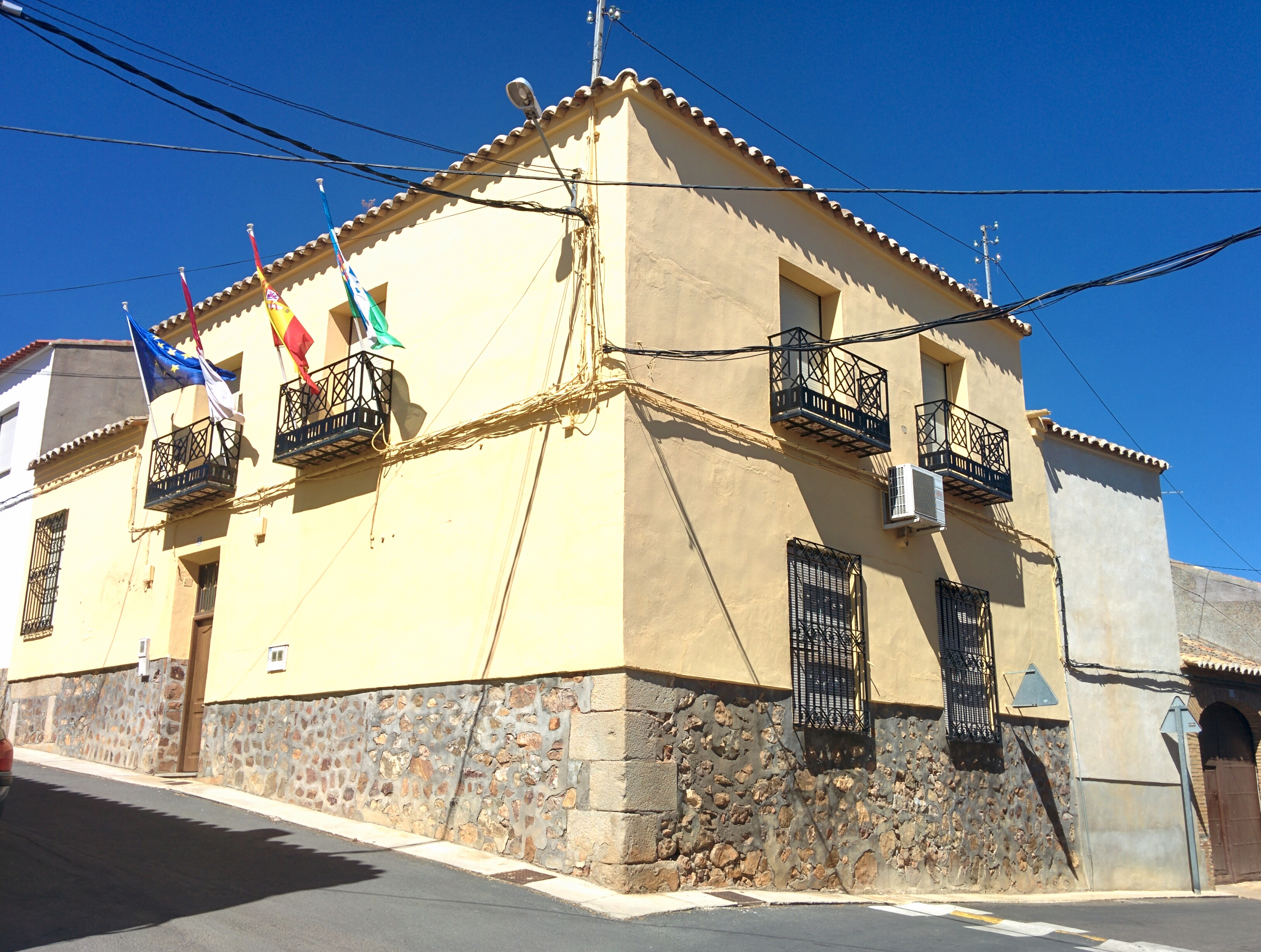 Casa consistorial de Marjaliza (Toledo, España).